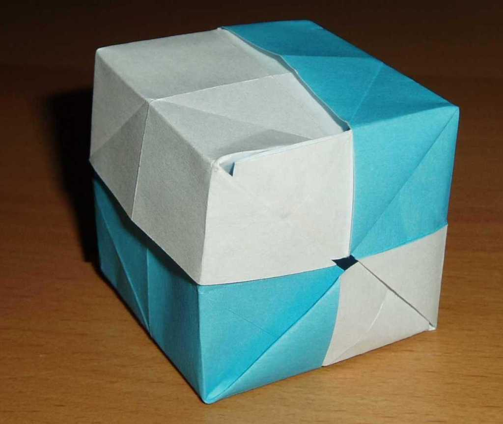 Origami iso-area model: Kawasaki Cube